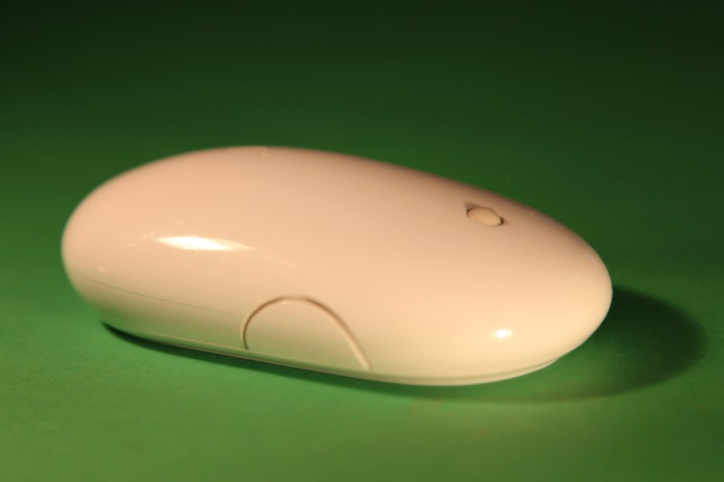 Mighty Mouse